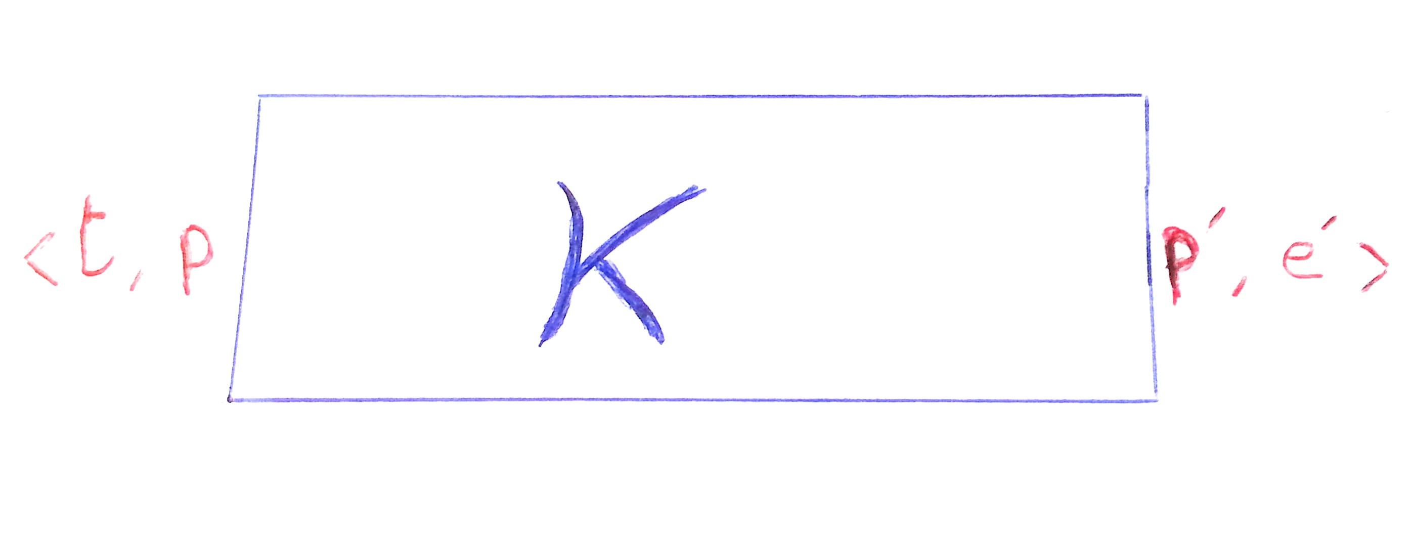 une image irréaliste d'une machine de Krivine